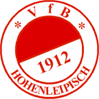 Logo des VfB Hohenleipisch